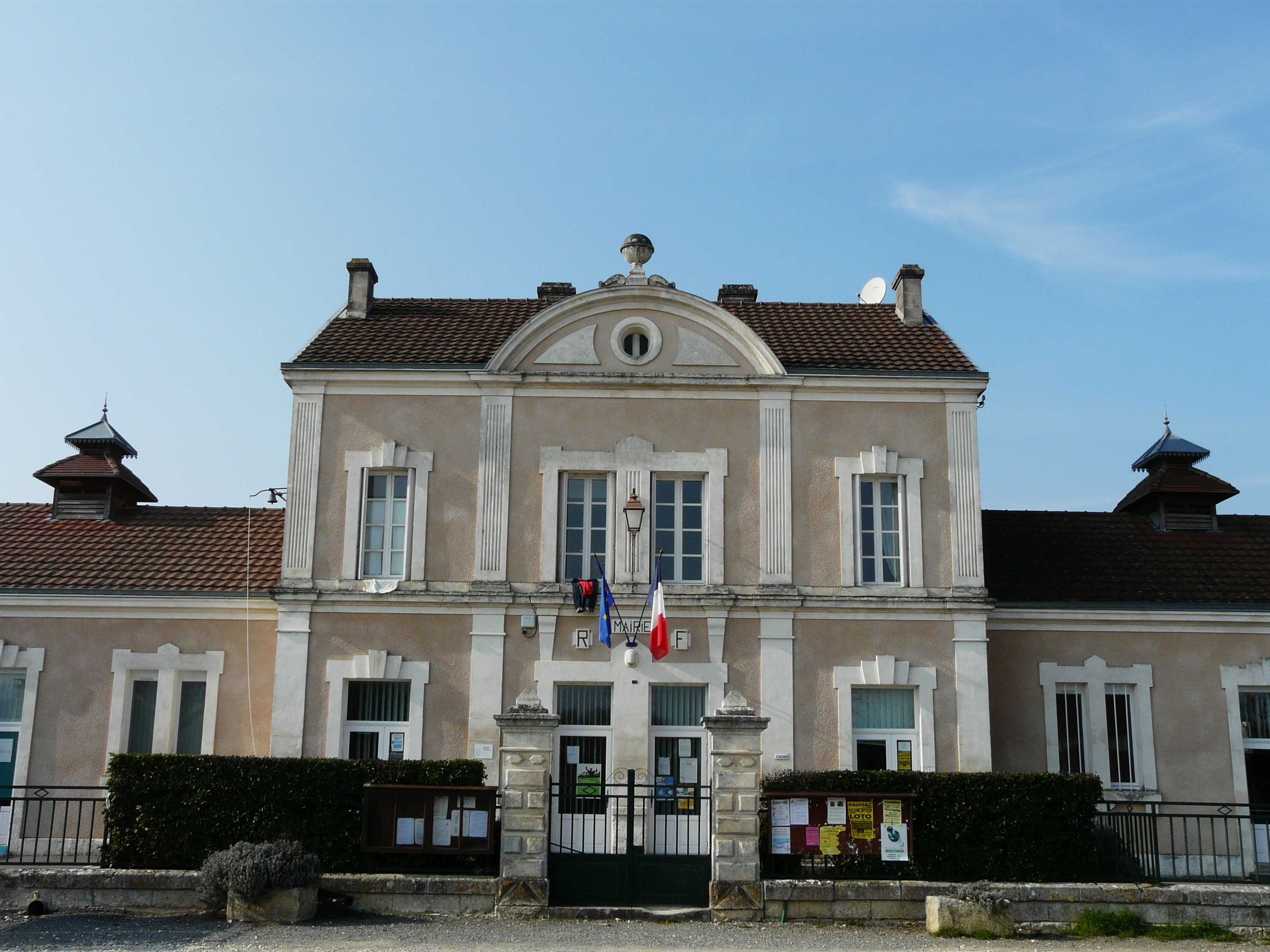 La mairie de Paussac-et-Saint-Vivien, Dordogne, France.